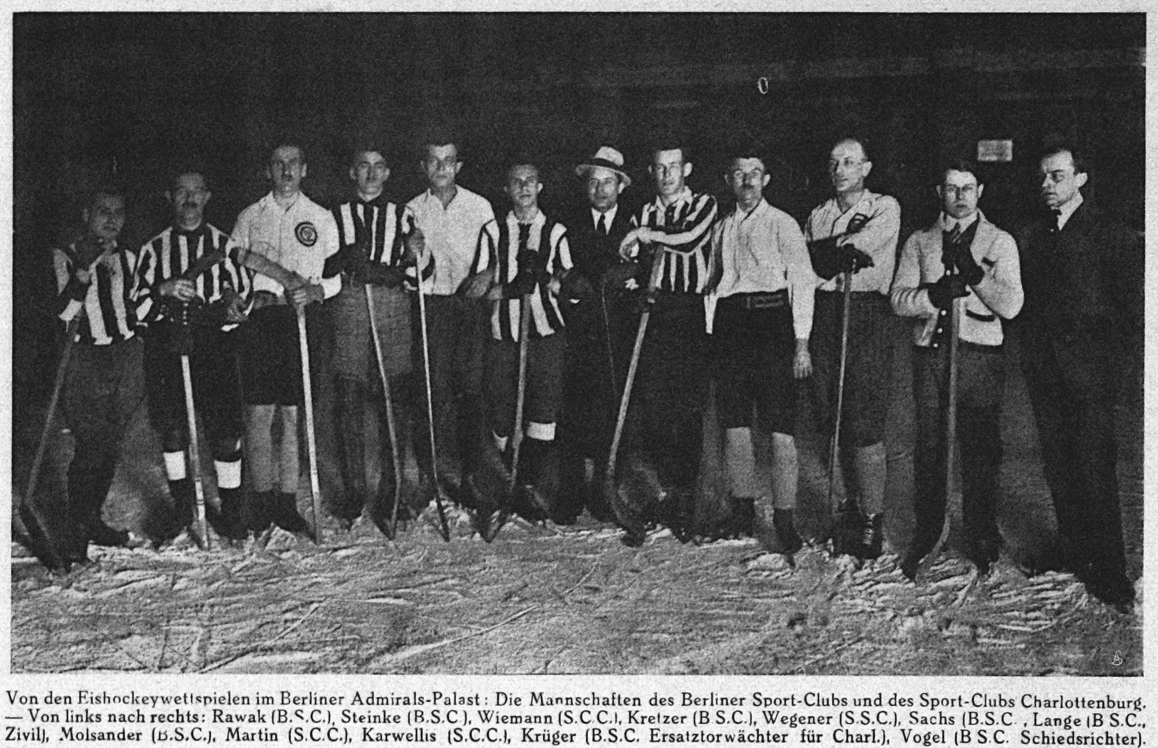 Sport im Bild, 7. Februar 1919, Nr. 6, S. 72 Von den Eisbockeywettspielen im Berliner Admirals-Palast: Die Mannschaften des Berliner Sport-Clubs und des Sport-Clubs Charlottenburg.Von links nach rechts: Rawak (B.S.C.), Alfred Steinke (B.S.C ), Wiemann (S.C C.), Kretzer (B. S.C.), Wegener (S.C.C.), Sachs (B.S.C.) , Lange (B.S.C., Zivil), Molsander (B.S.C.), Martin (S.C.C.), Karwellis (S.C.C.), Krüger (B.S.C.; Ersatztorwächter für Charl.), Vogel (B. S.C. Schiedsrichter).